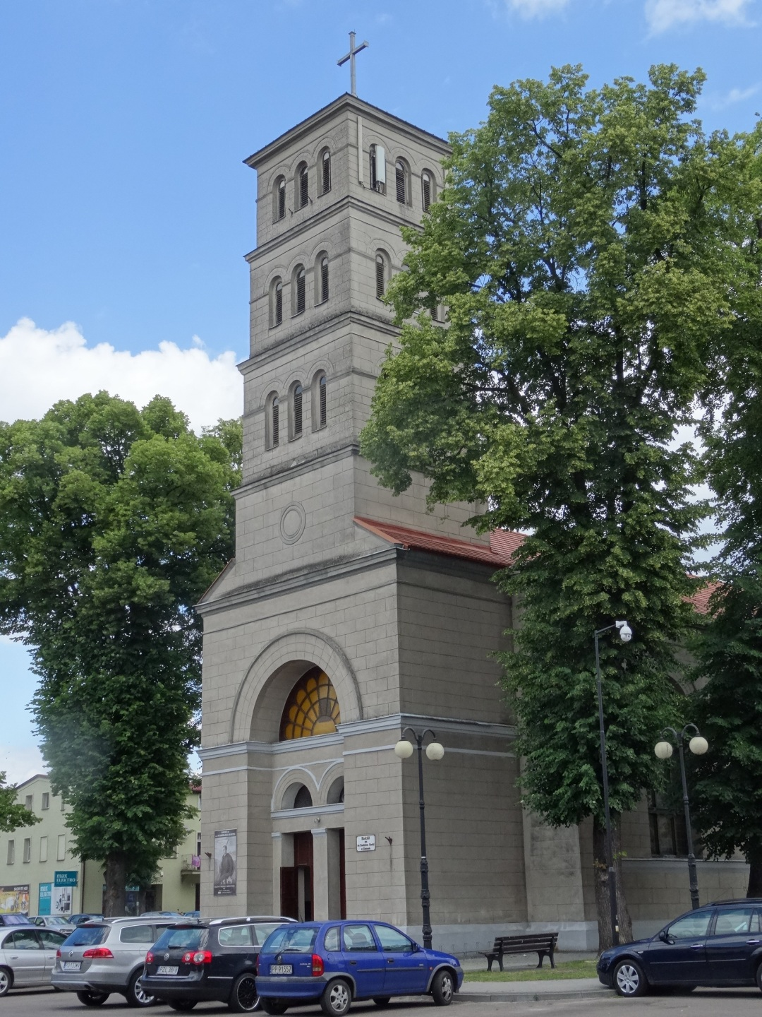 Kościół św. Stanisława Kostki w Złotowie